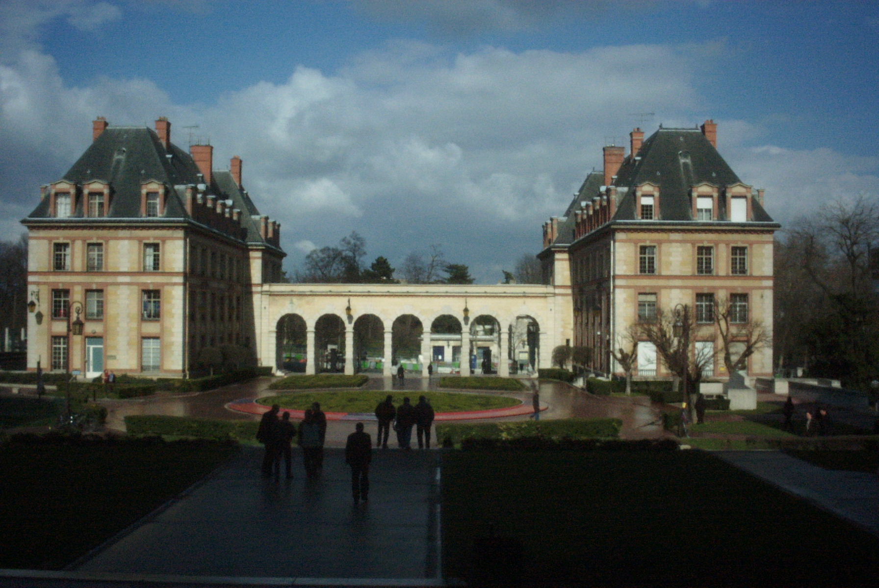 De ingang van het cite universitaire complex in Parijs.